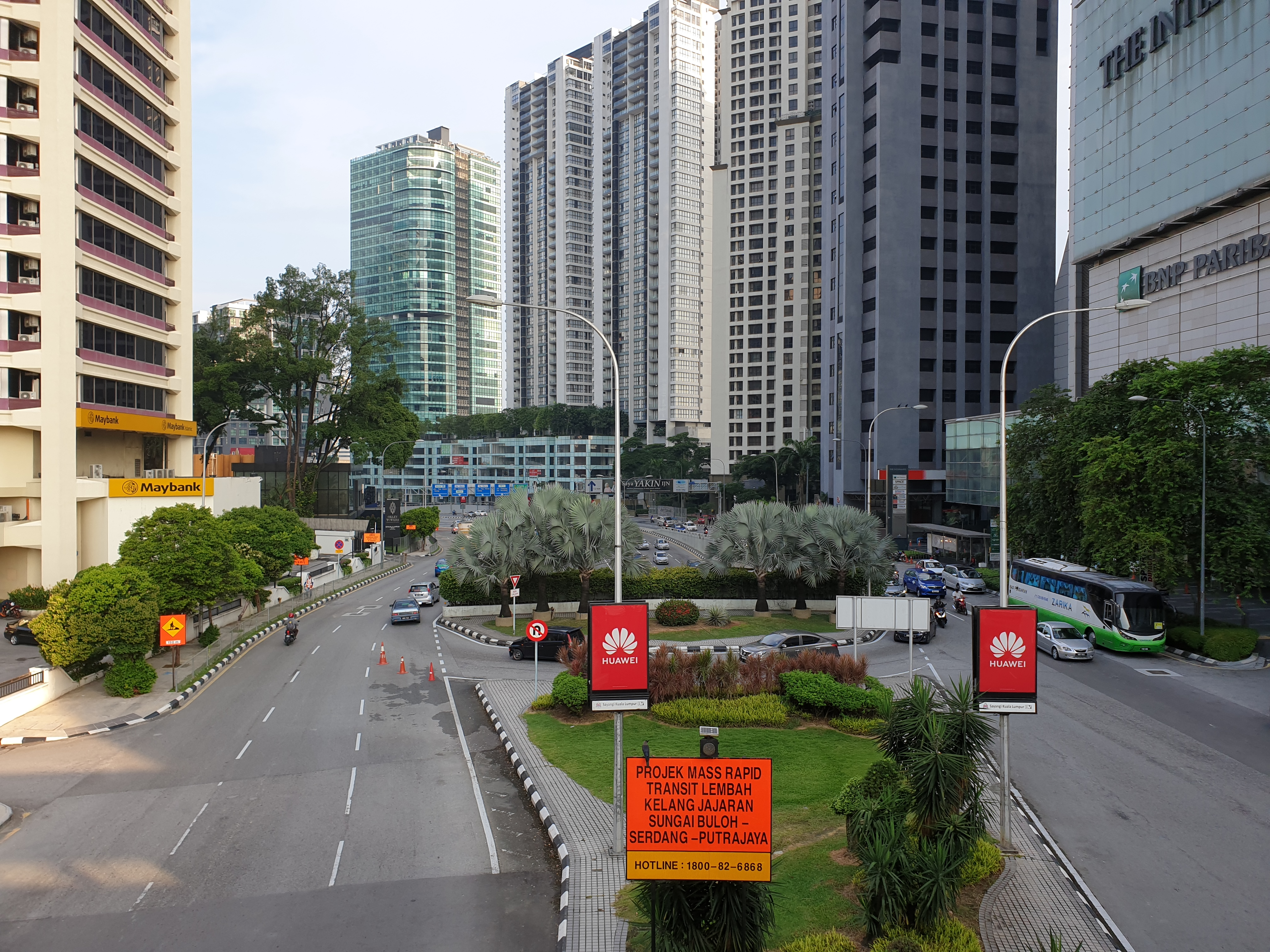 Ampang Park SSP Line